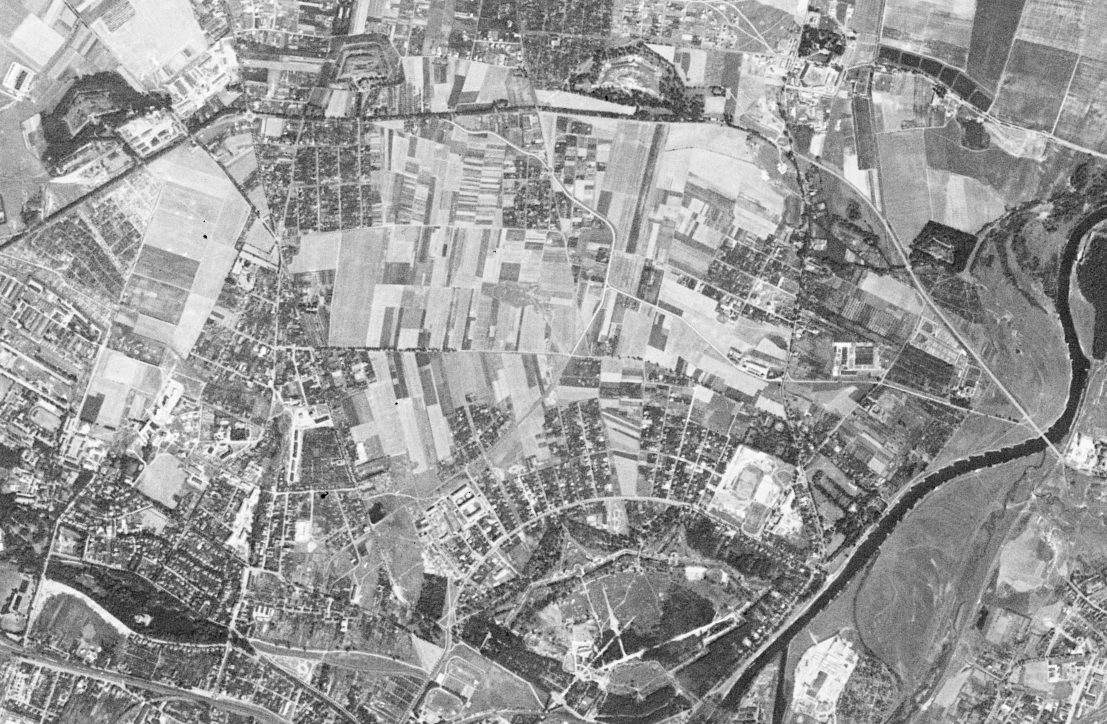 Winogrady, od Cytadeli do ulicy Naramowickiej. Widoczny także Sołacz i Golęcin, forty VI, Va, V i IVa, a także przebieg dróg krajowych nr 11 i 92. Zdjęcie z amerykańskiego satelity wywiadowczego KH-4A 1023, z 23 sierpnia 1965 r.